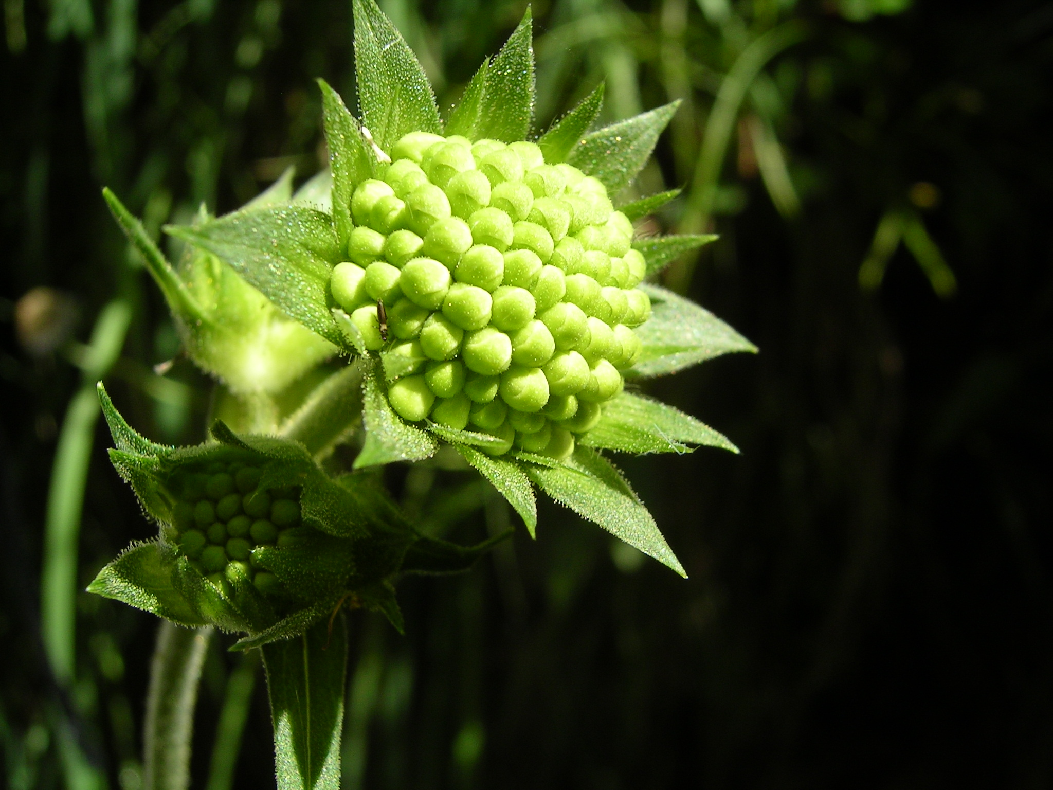 (en) Knautia dipsacifolia (de) Wald-Witwenblume (Knautia dipsacifolia) Place/Ort: Berner Oberland, CH.